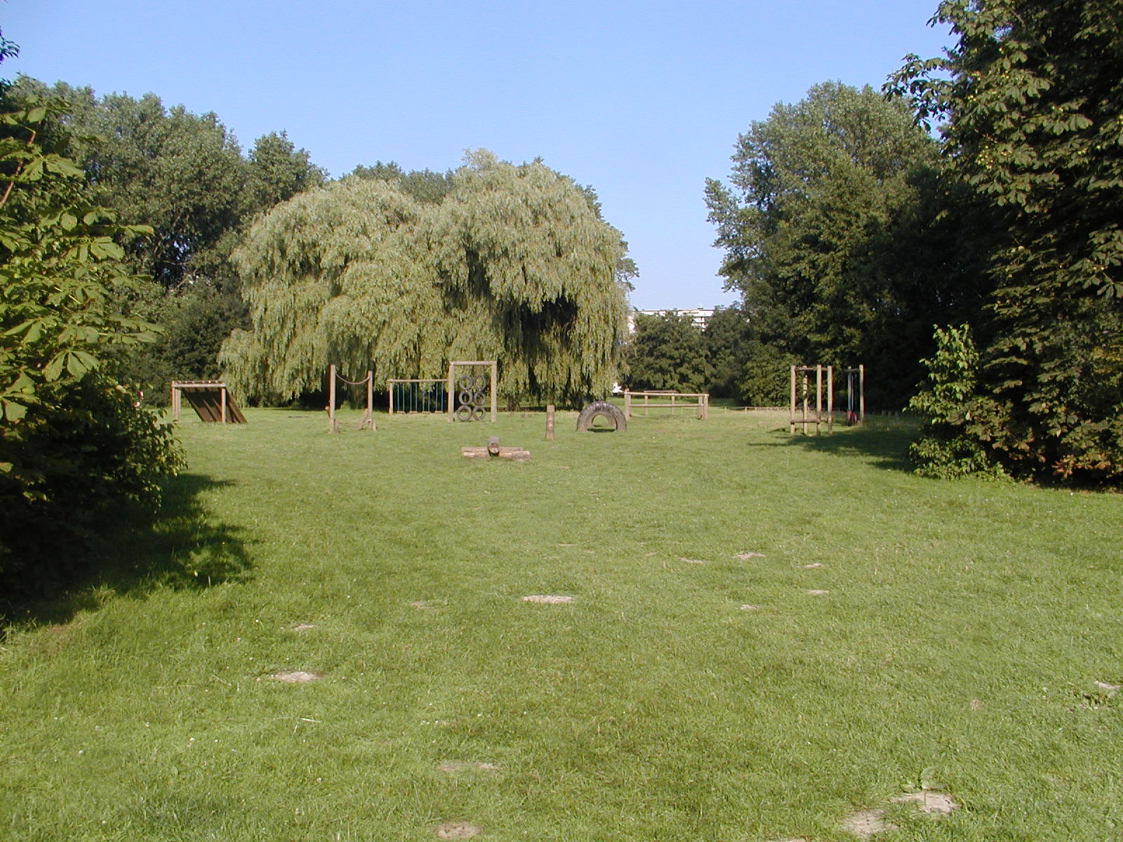 Blaarmeersen en Gent - ludejo aŭtoro: Yves NEVELSTEEN dato: julio 2005